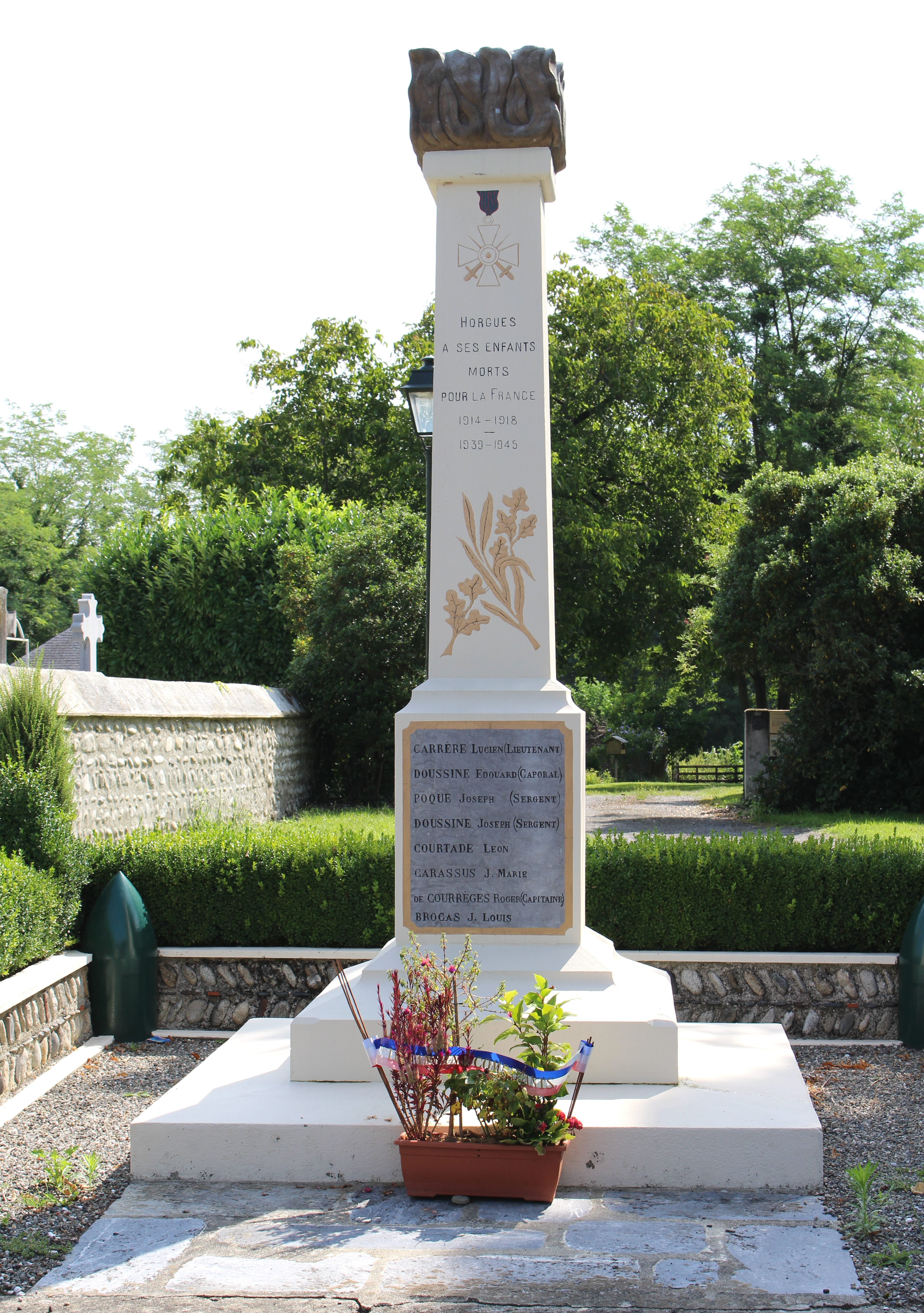 Monument aux morts de Horgues (Hautes-Pyrénées)